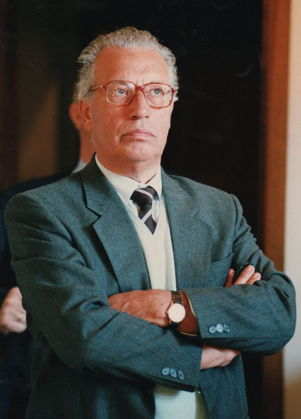 23 settembre 1995